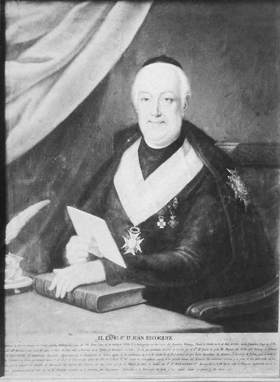 Retrato de Juan Escoiquiz (1747-1820)